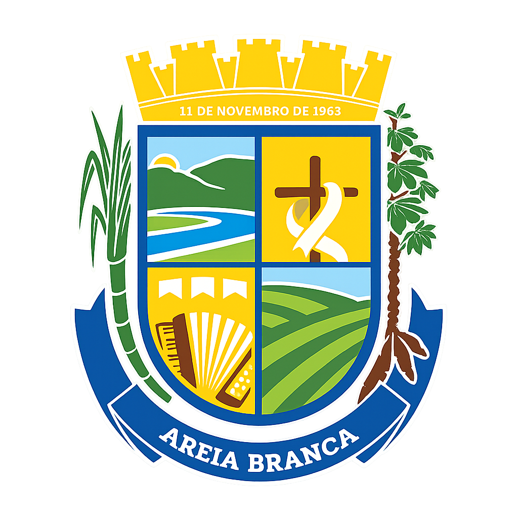 Brasão Município de Areia Branca-SE